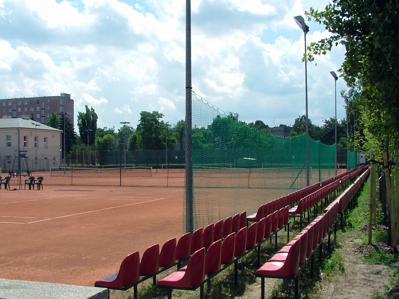 PL, Warsaw, Poland, Praga Południe, Grochów, Klub Sportowy "Orzeł" ul. Podskarbińska 14, korty tenisowe, stadion lekkoatletyczny